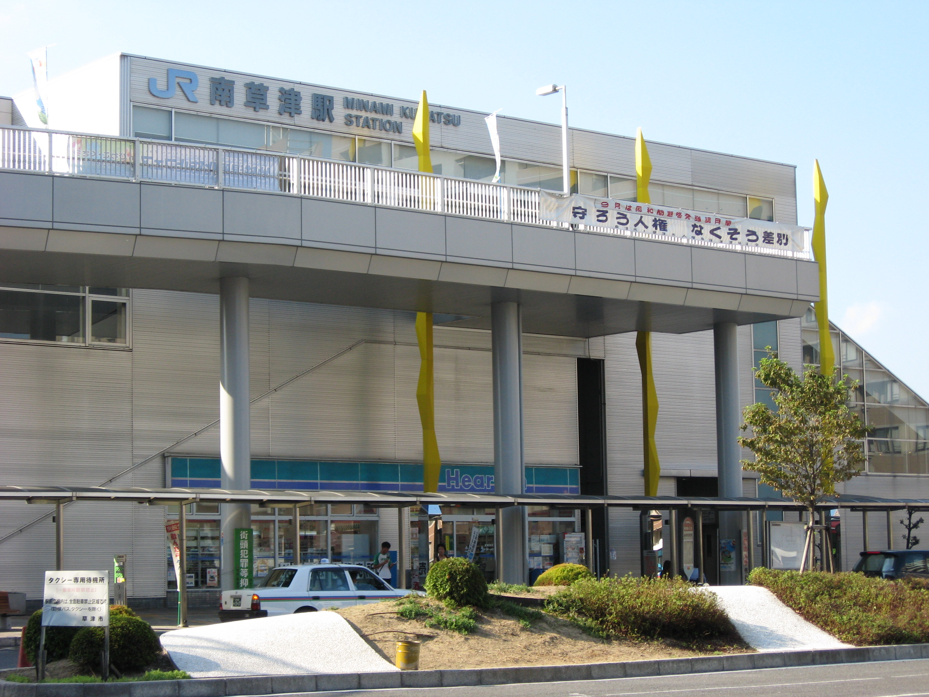 Minami-Kusatsu Station East Gate